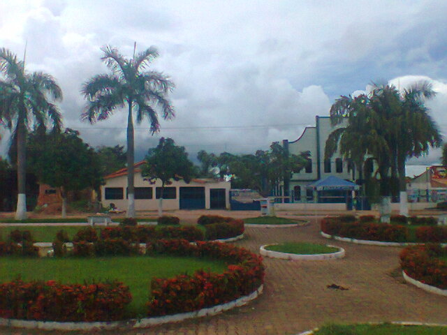 Canteiro central da rodovia PA-275 em Eldorado dos Carajás